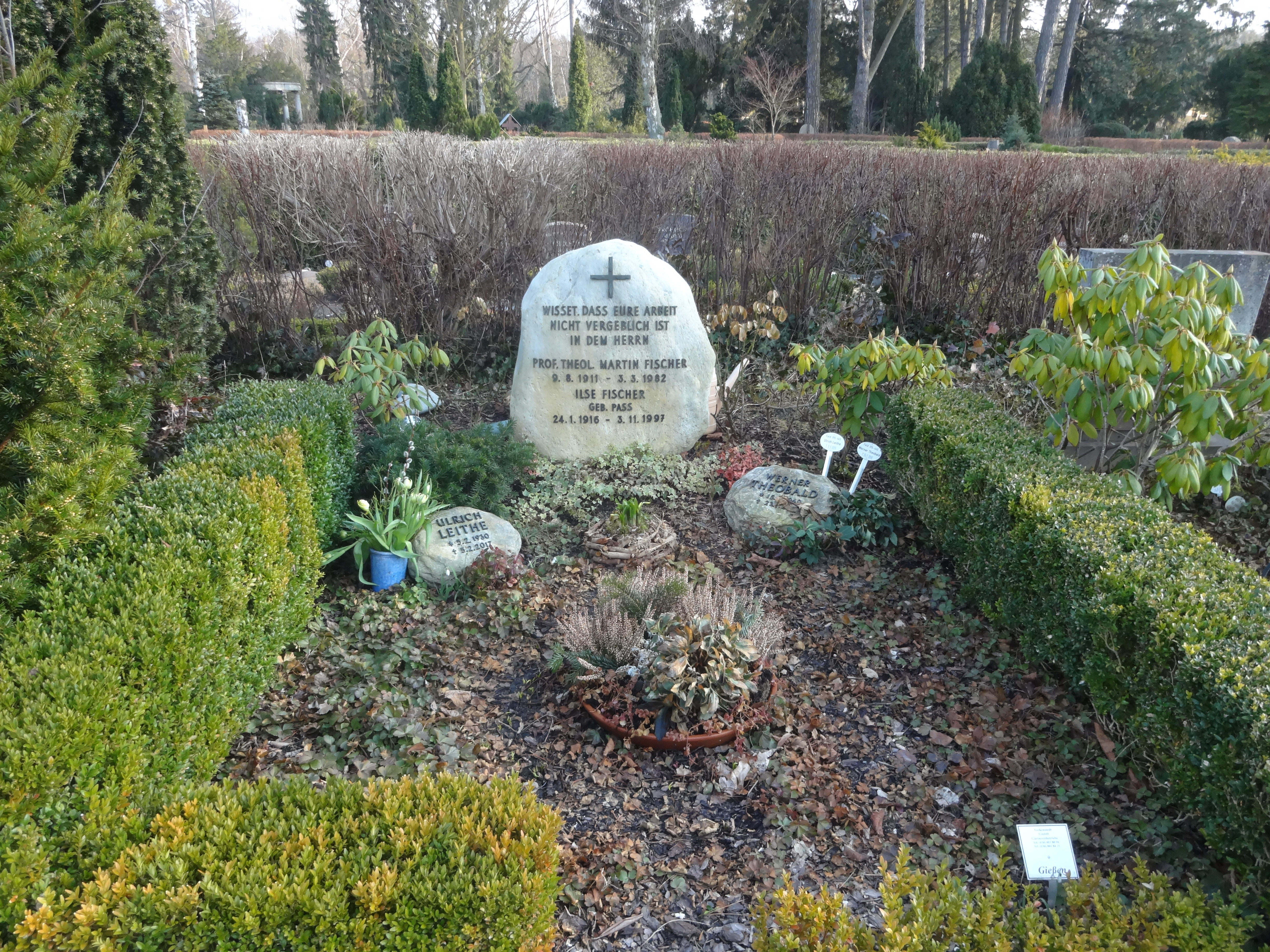 Grabstätte des Theologen Prof. Martin Fischer auf dem Friedhof Zehlendorf in Berlin